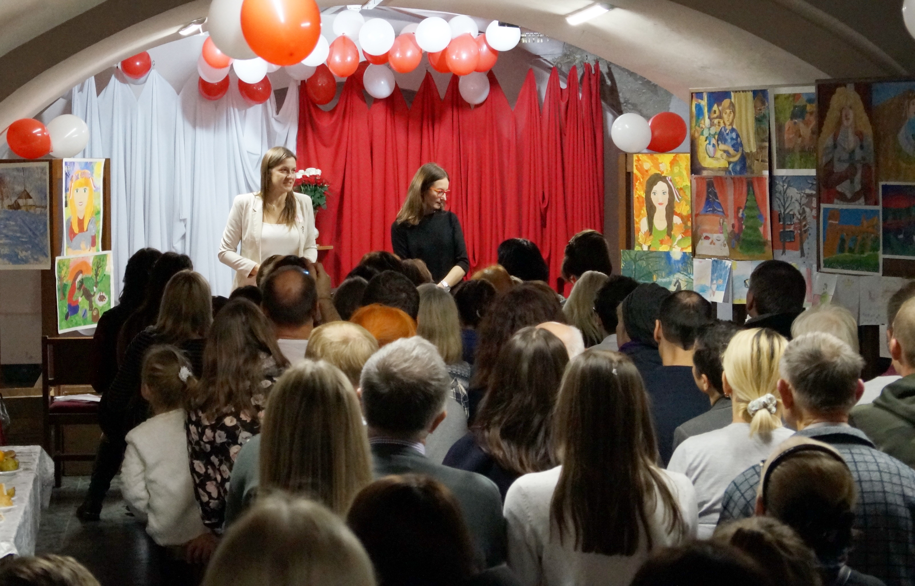 Obchody stulecie odzyskania Niepodległości przez Polskę. Uroczystości w Mińsku, 2018r.